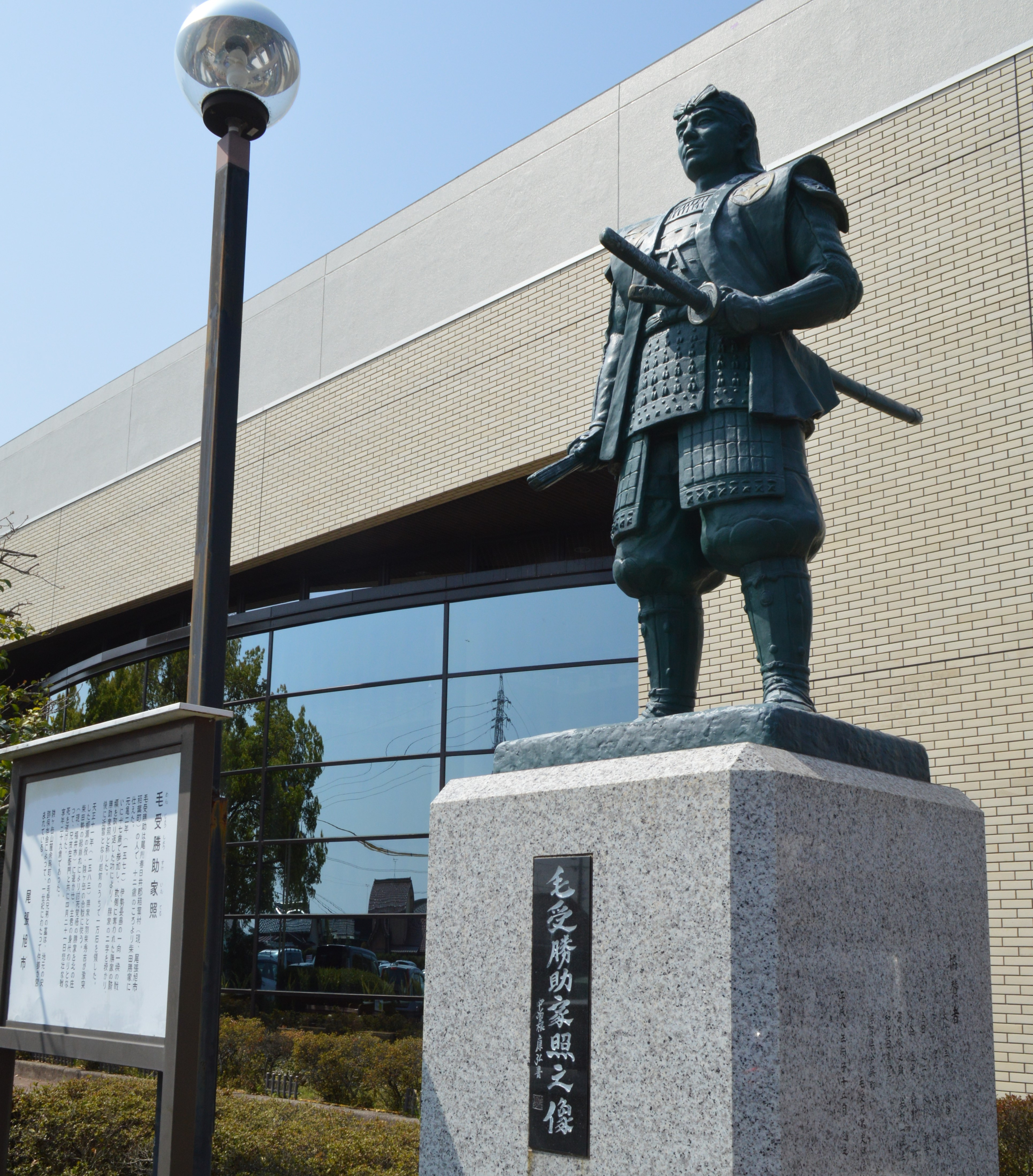 愛知県尾張旭市の尾張旭市文化会館（背後）と、敷地内にある「毛受勝助家照之像」（めんじゅかつすけいえてる、毛受勝照）。